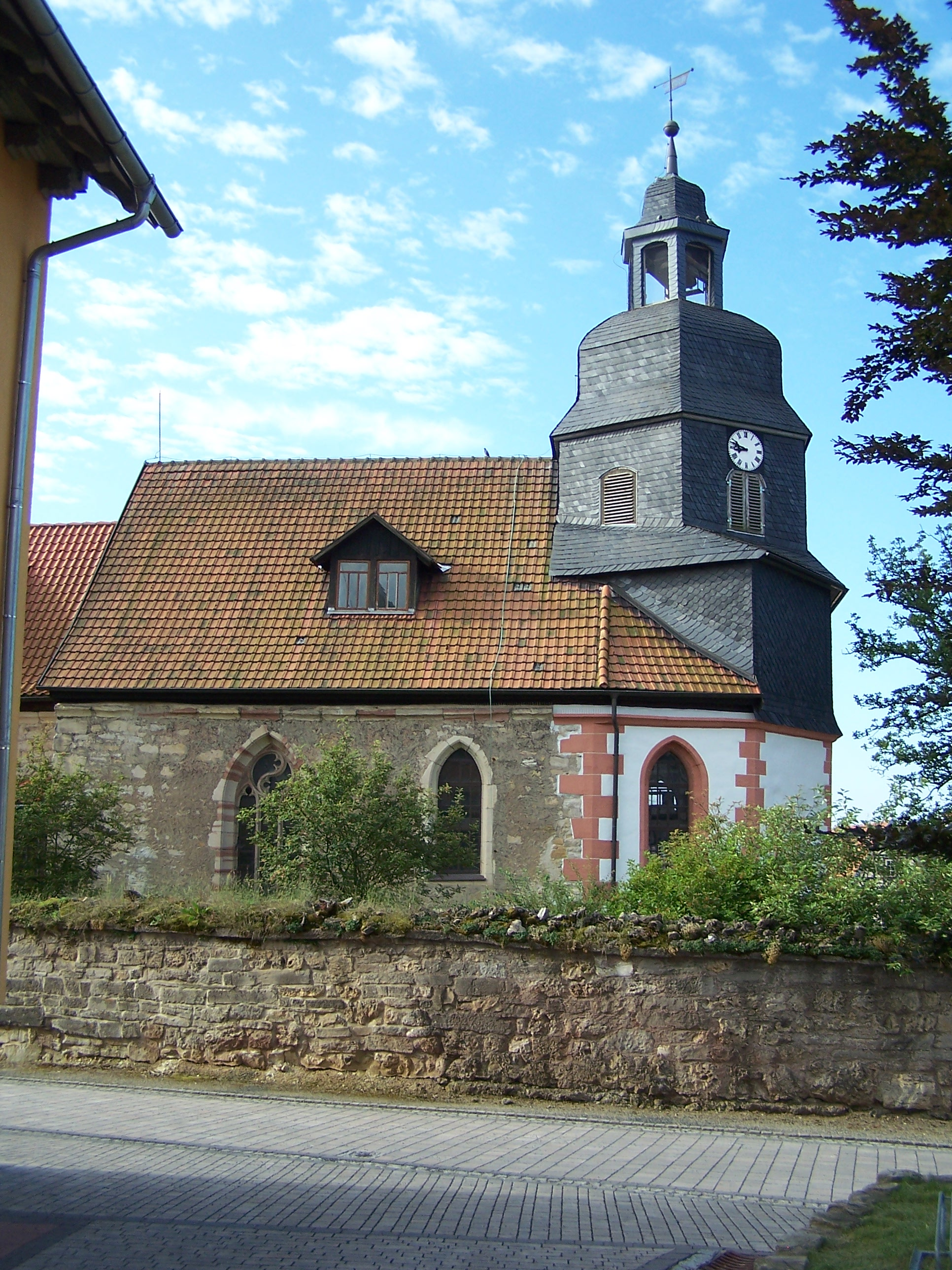 Ansichten und Details zur St.-Georgskirche von Gumpelstadt.